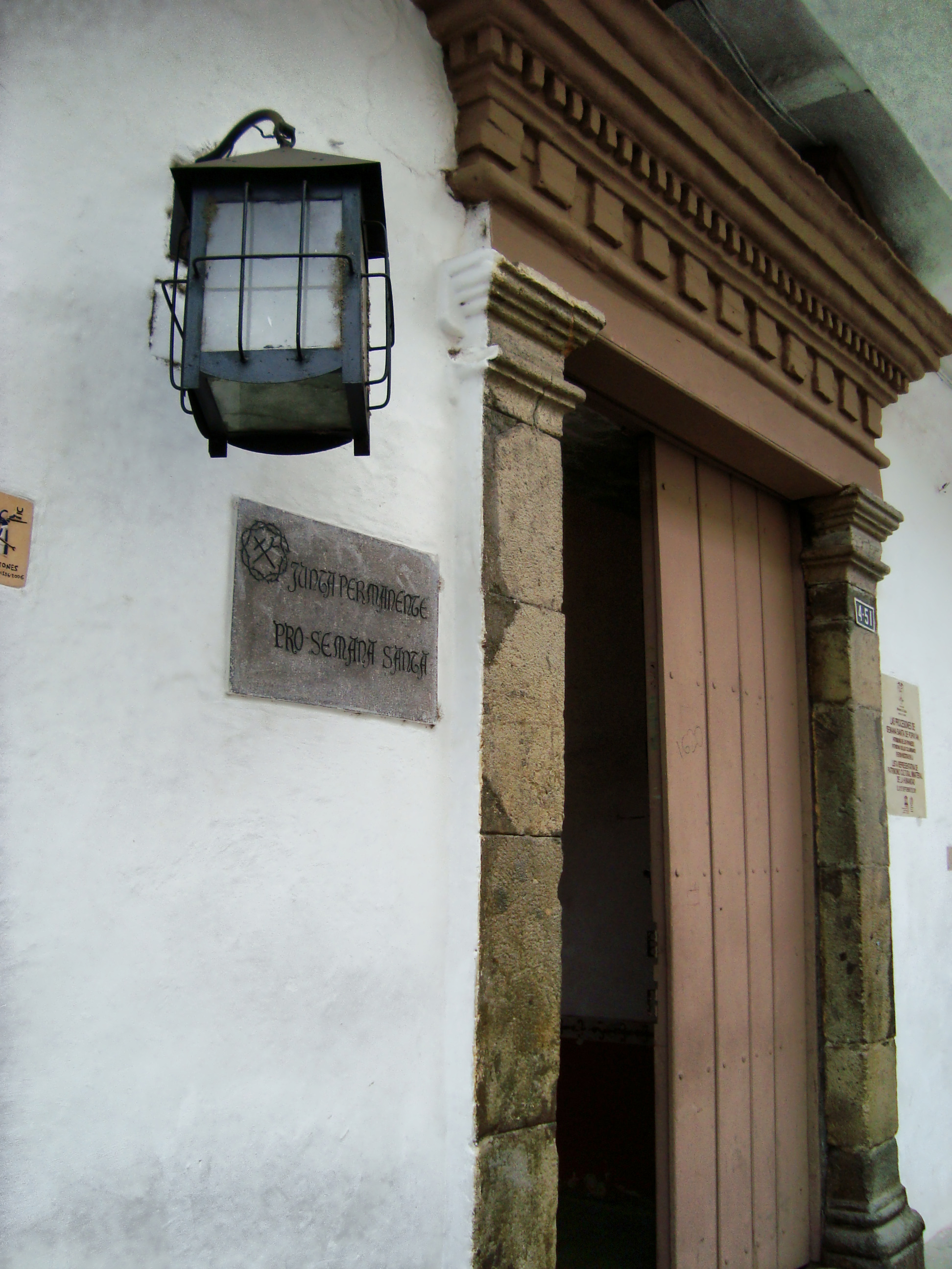 Casa para actividades relacionadas con la Procesiones de Semana Santa